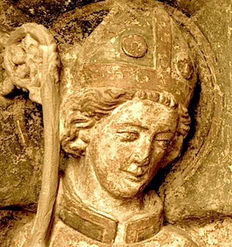 Образ святого Аурея на могильной плите в церкви святого Эгидия (Хайльбад-Хайлигенштадт)